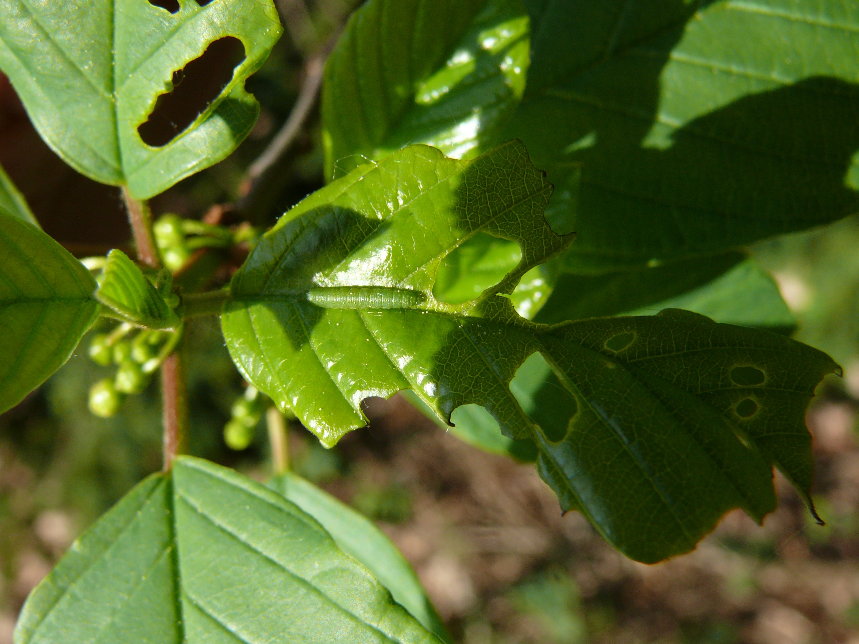 Gonepteryx rhamni